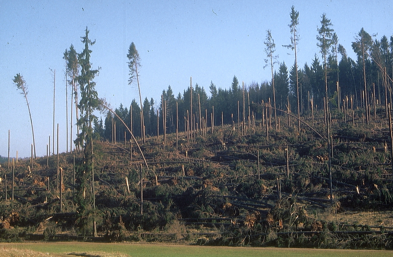 Der Orkan Wiebke knickte im März 1990 auf der Schwäbischen Alb ganze Fichtenbestände wie Streichhölzer um